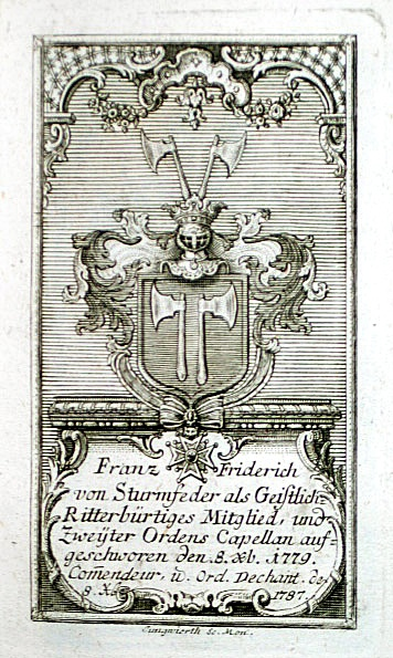 Wappenstich des kath. Priesters und Augsburger Bistumsverwesers Franz Friedrich von Sturmfeder (1758-1828)